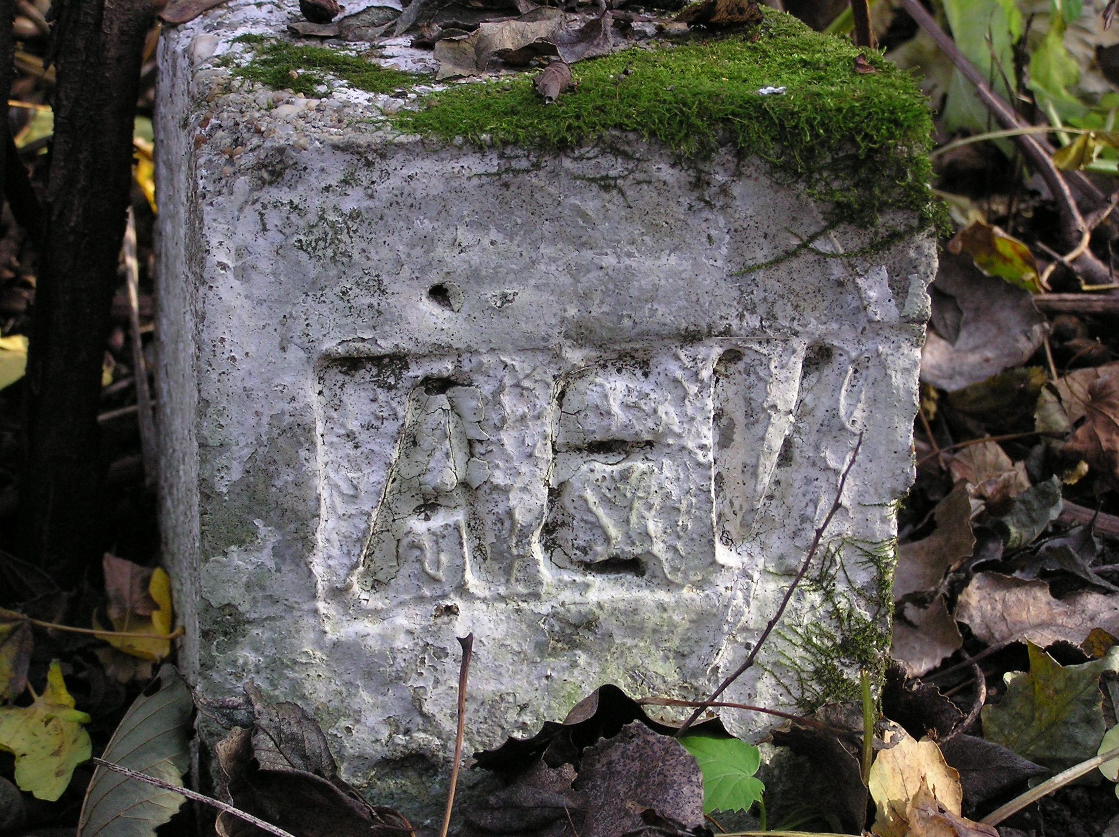 ÁEV feliratú, 15X15X60 cm méretű kisajátítási határkő (kisajkő) a Felsőtárkányi Állami Erdei Vasút vonalán Egerben, a 11/1977 MÉM-rendelet, majd a 178/2008 Korm. rendelet szerint kialakítva. Nem hektométerkő, mivel nem tartalmaz szelvényszámot, és nem felel meg szelvénykő méreteit leíró szabványnak se